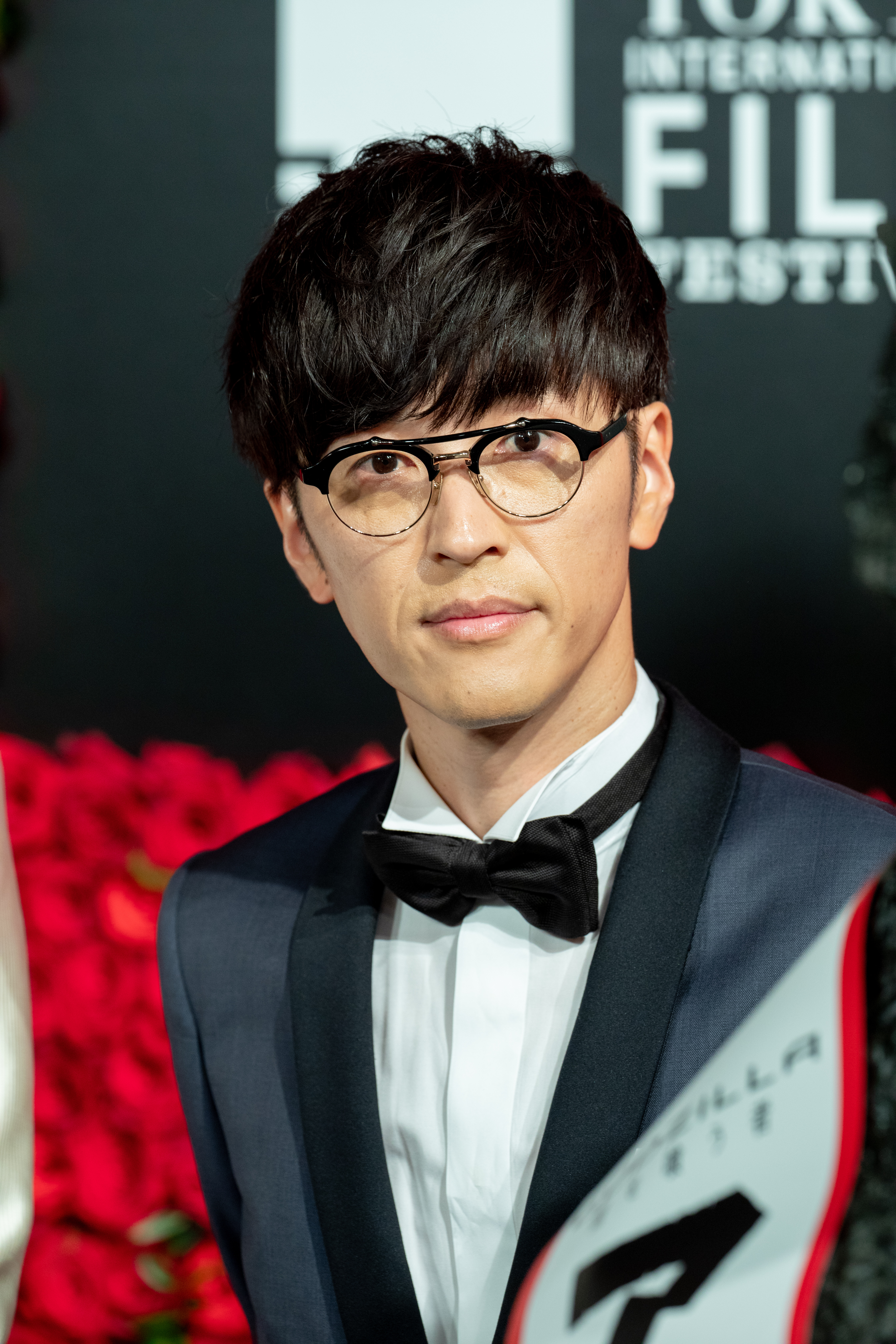 第30回 東京国際映画祭 オープニングセレモニー 櫻井孝宏 (GODZILLA 星を喰う者)